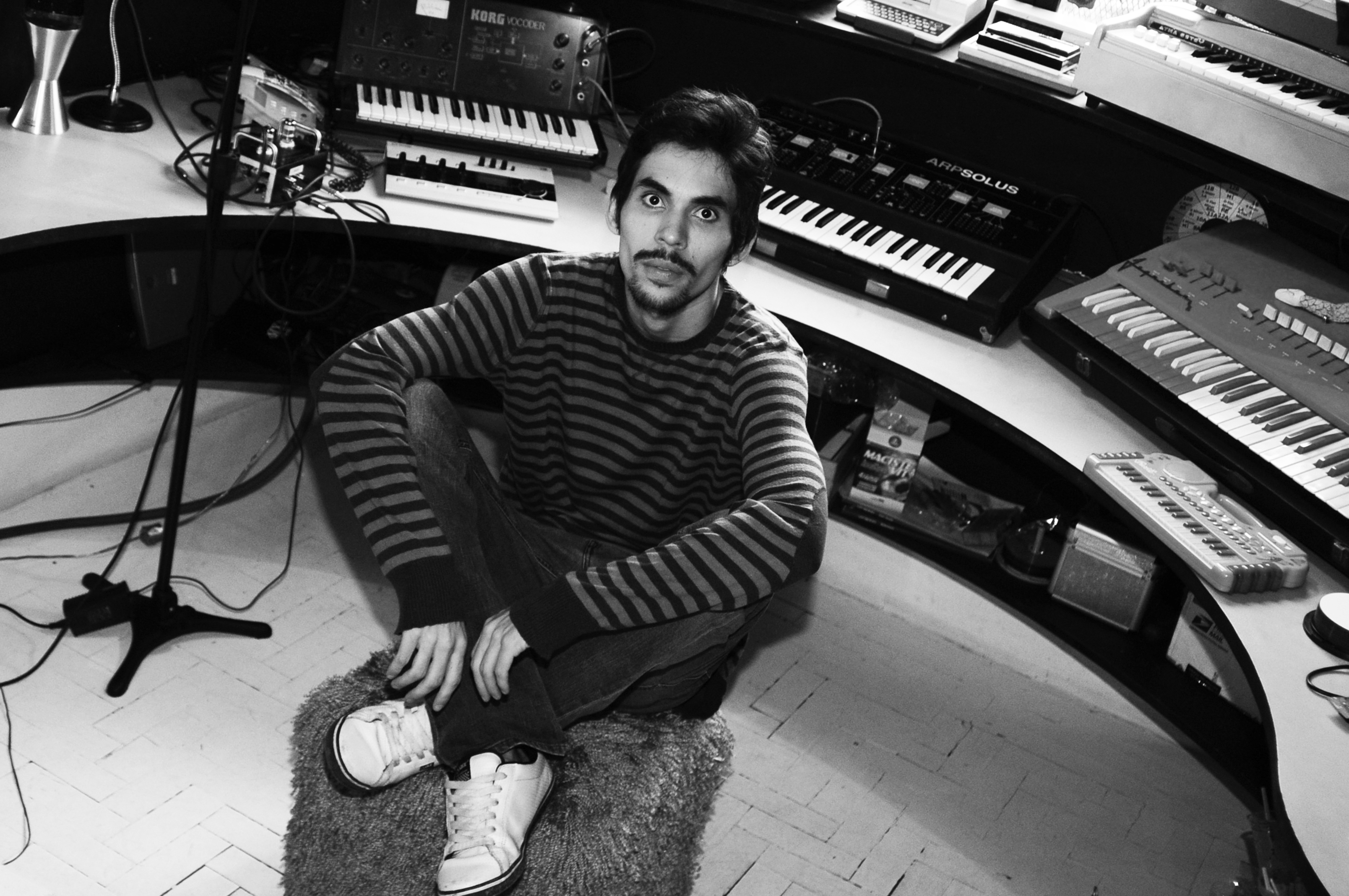 DaDa Attack sentado no estúdio